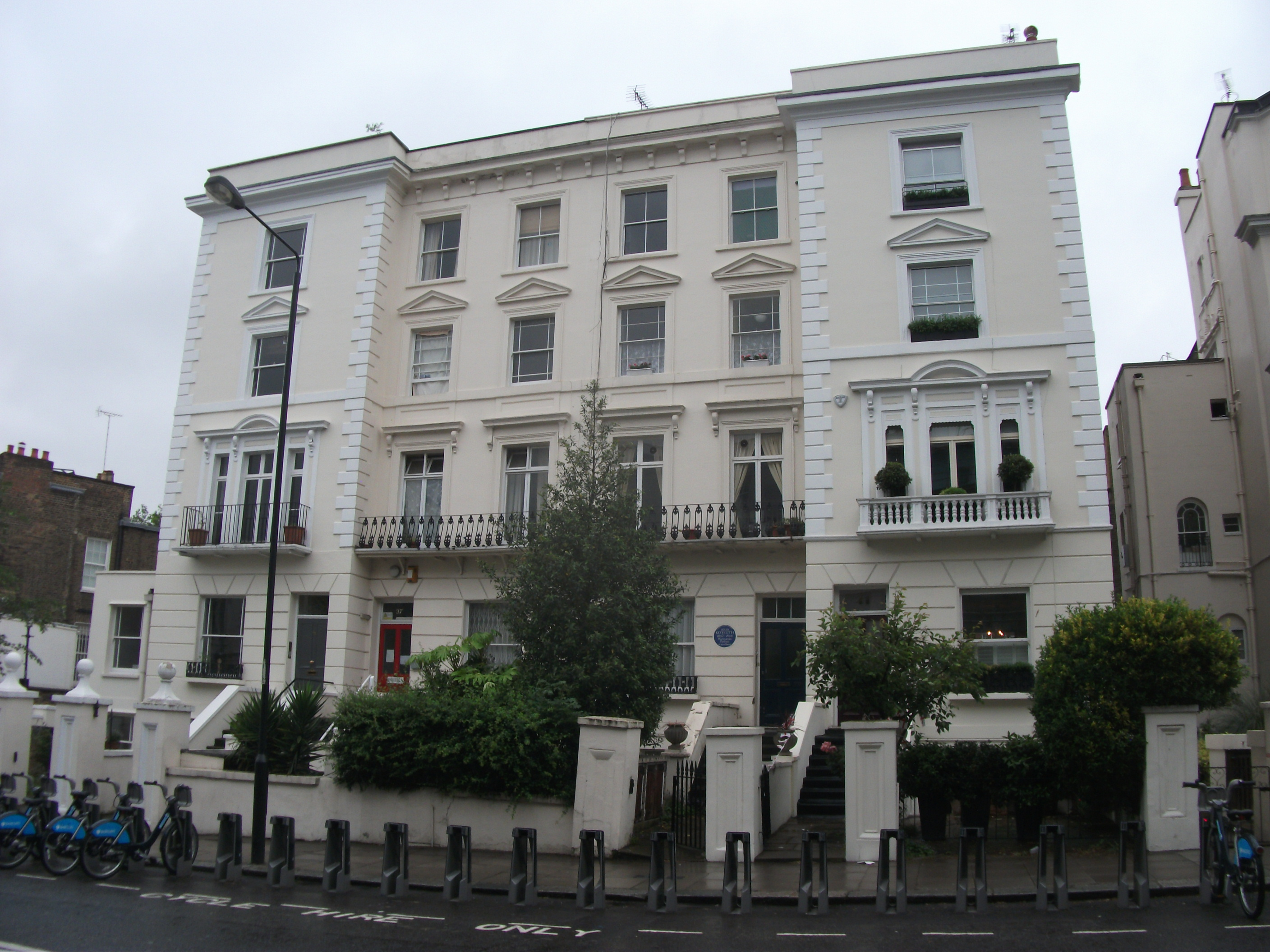 Kossuth Lajos annak idején újépítésű házba költözött, a 39-es számú házat ugyanis éppen az ő Angliába érkezésének évében, 1851-ben építették. A vajszínűre festett, négyszintes épületen kék emléktábla jelzi, hogy híres történelmi személyiség lakott benne:Louis Kossuth, Hungarian patriot. (A helyszín címe: 39 Chepstow Villas, Notting Hill, London, W11 3DP)